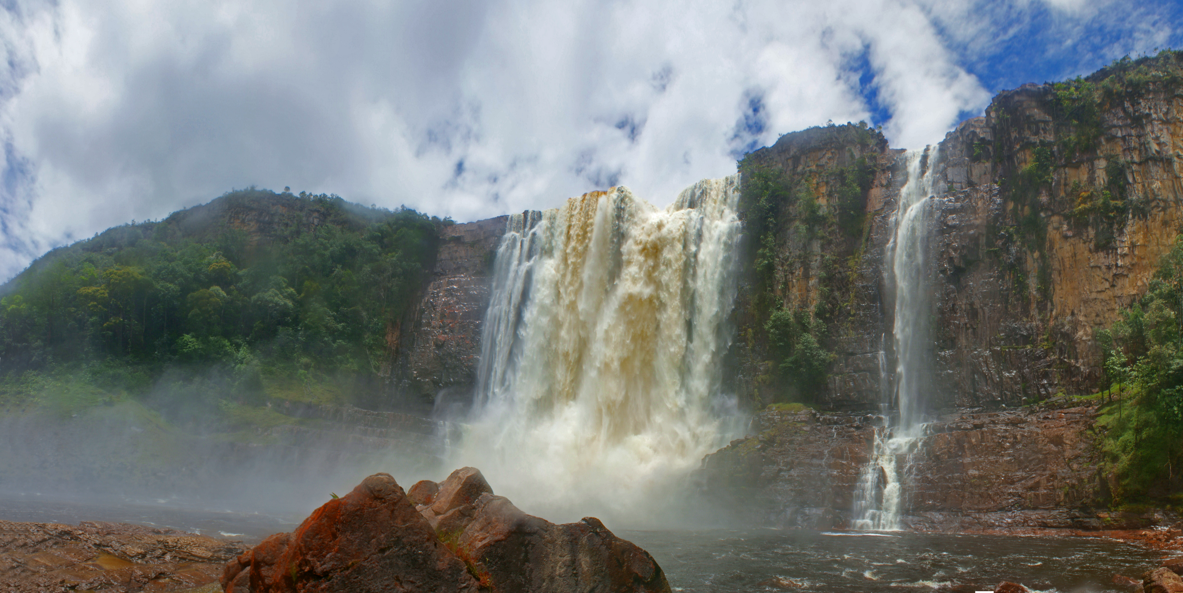 Chinak-Meru Aponguao (río que sube y baja).